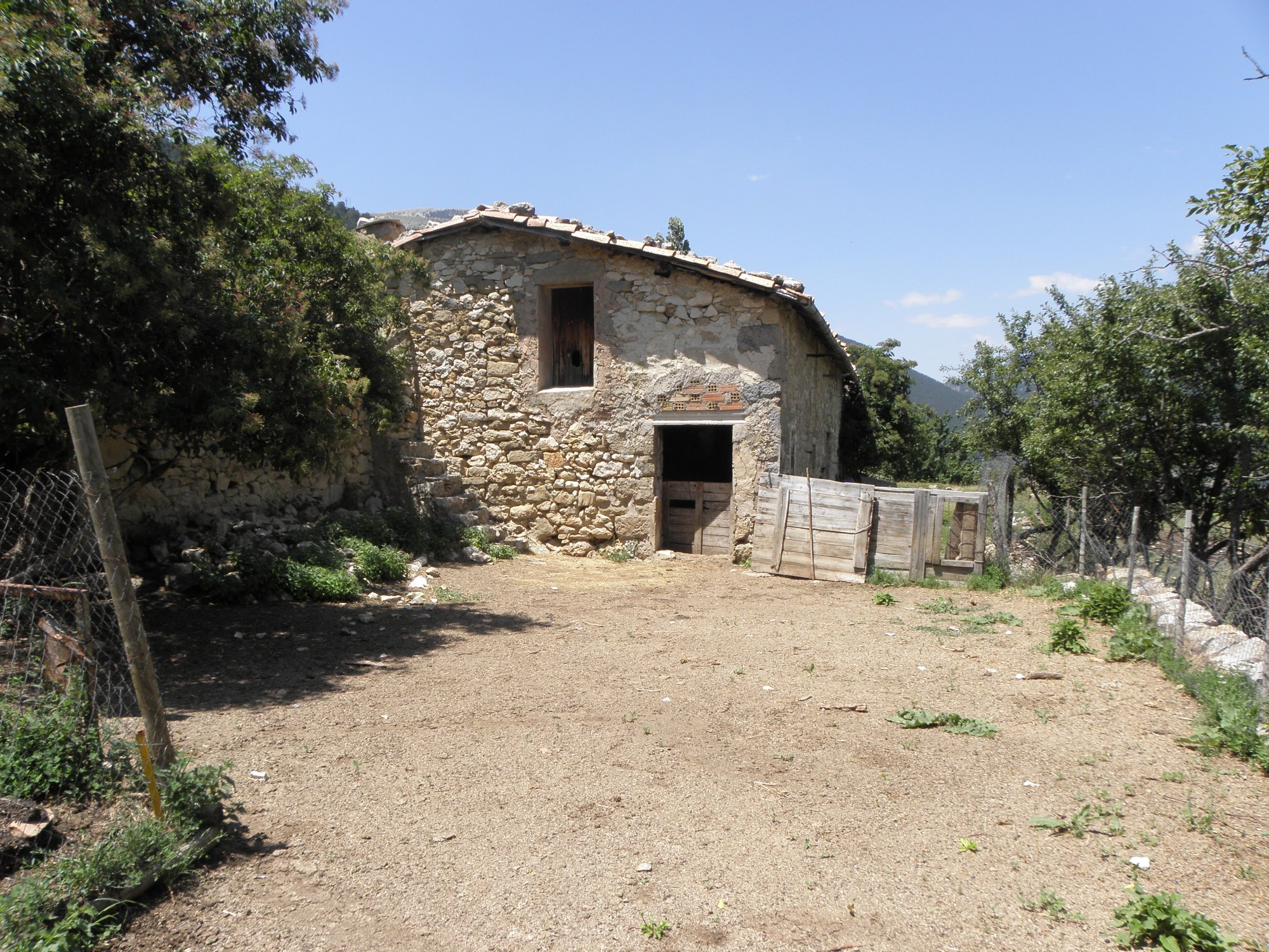 La masia de Cal Culrodó, al poble de la Coma (municipi de la Coma i la Pedra, Vall de Lord, Solsonès) La part exterior del corral, adosada a la façana sud-est de la masia